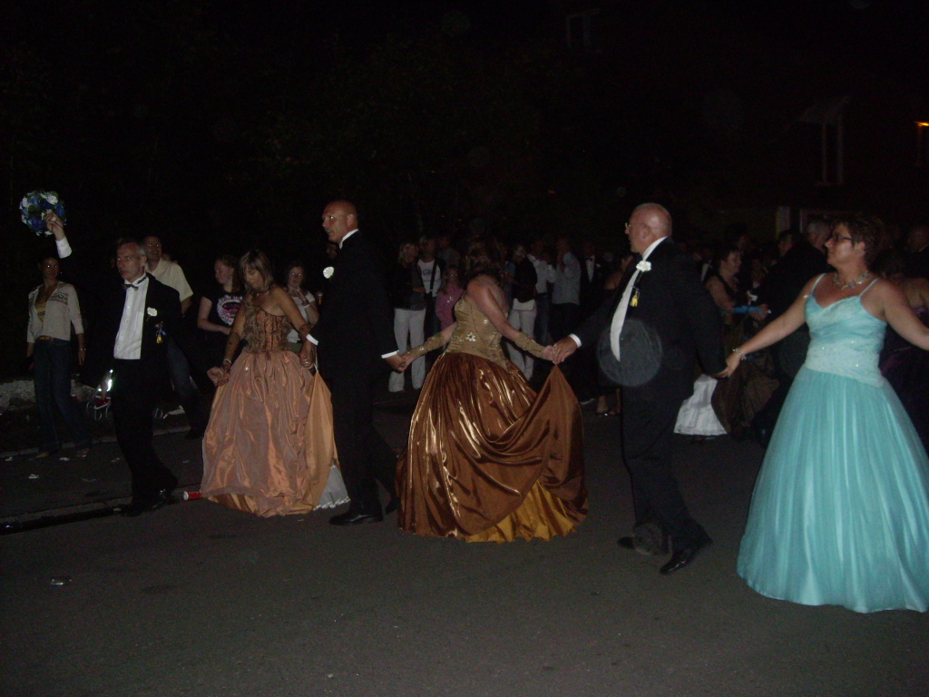 Cramignon door de Blauwen in Hermalle-sous-Argenteau, op 25 augustus 2009.